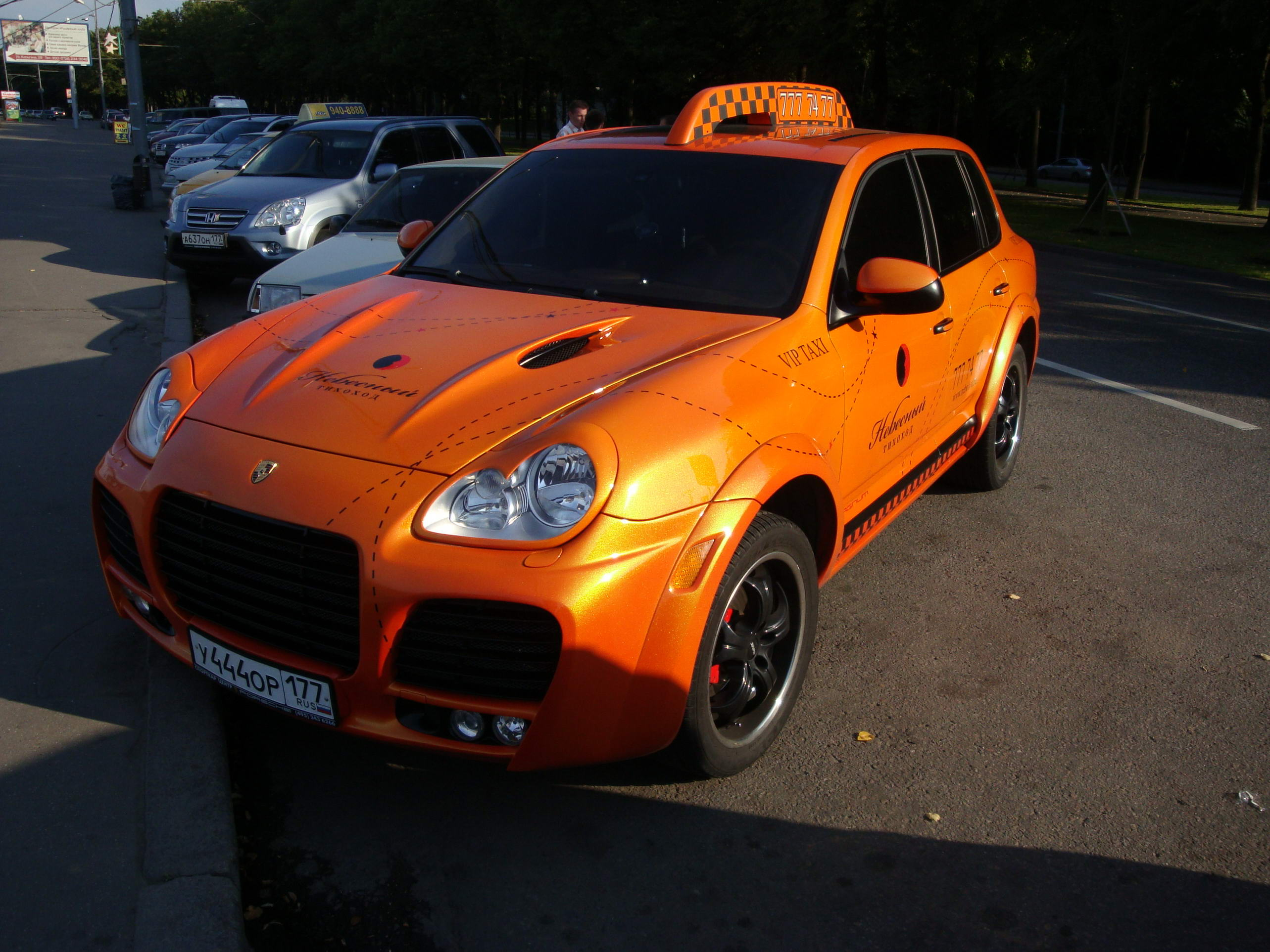 Автомобиль Порше Кайен, использующийся для предоставления услуг такси в Москве. Компания-владелец автомобиля - «Небесный тихоход».